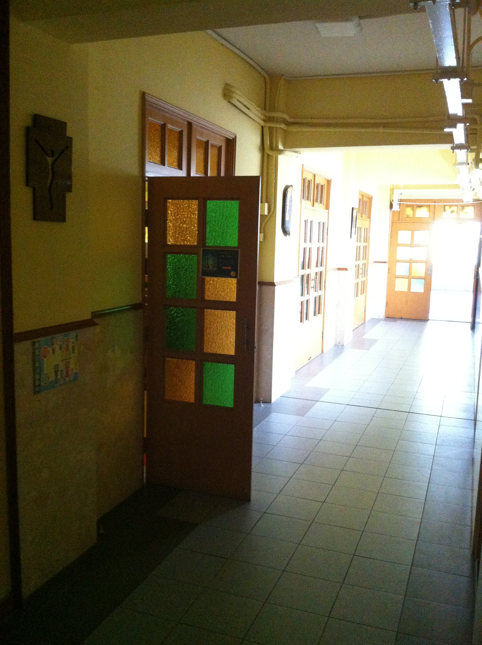 中文（香港）: 聖保祿彌撒中心, 香港, 中國